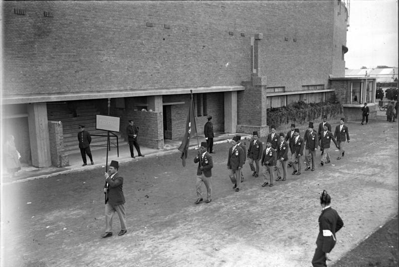 Die Eröffnung der olympischen Spiele in Amsterdam! Erste Aufnahmen vom Aufmarsch der Nationen im olympischen Stadion, unseres nach Amsterdam entsandten Sonder-Bild-Berichterstatters! Einmarsch der aegyptischen Teilnehmer in das olympische Stadion.